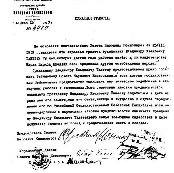 Охранная грамота В. И. Танееву за подписью В. И. Ленина